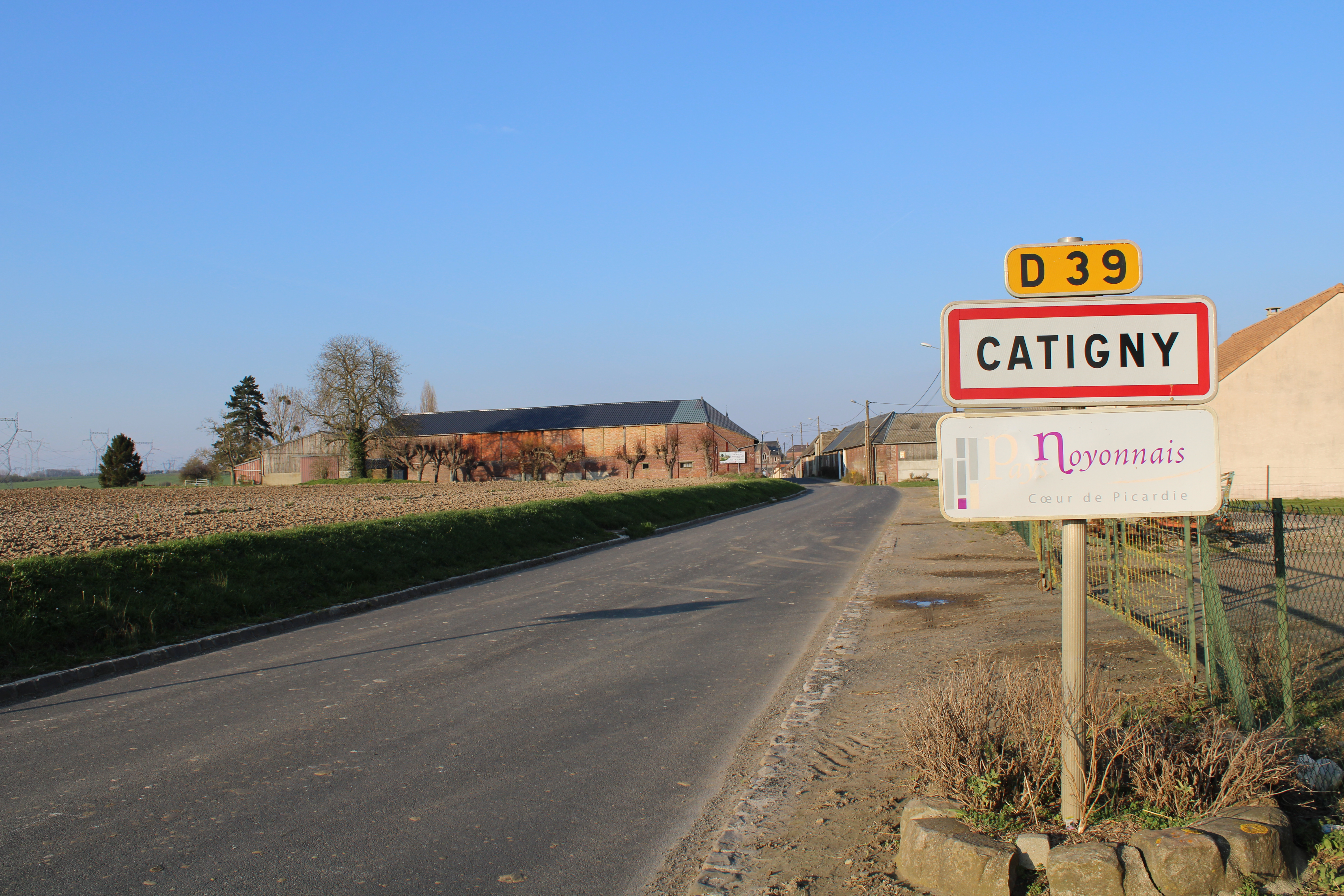 Entrée du village.